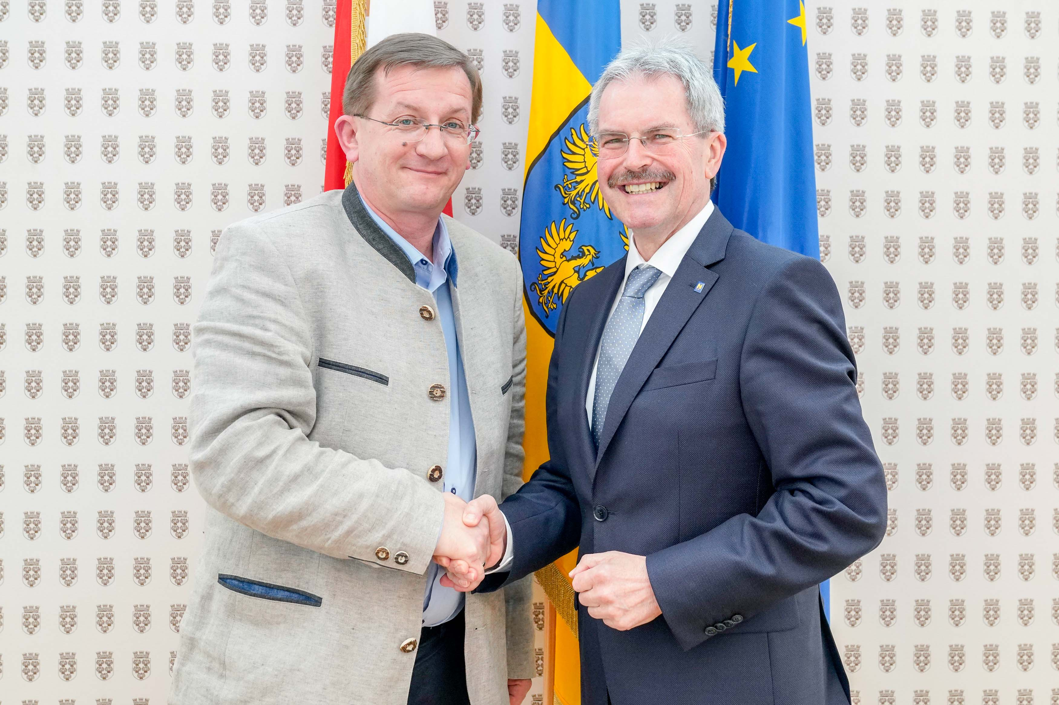 Landtagspräsident Karl Wilfing führt die Konstituierung der Landtags-Ausschüsse durch. Am Foto: Präsident Wilfing gratuliert LAbg Dieter Dorner zur Wahl als Obmann des Verkehrs-Ausschusses